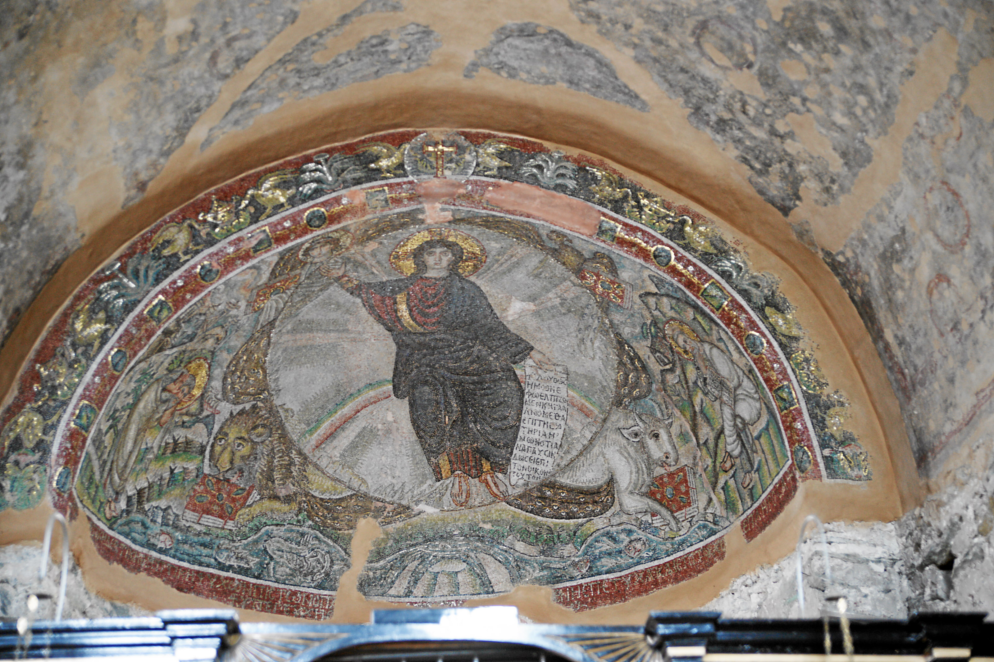 Moni Latomou, Hosios David - Kirche: Mosaik